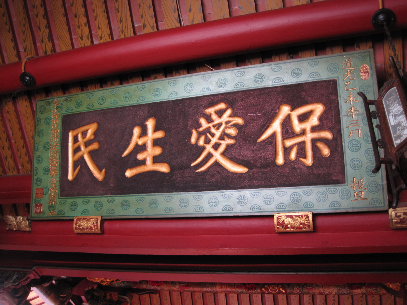 興濟宮保愛生民匾